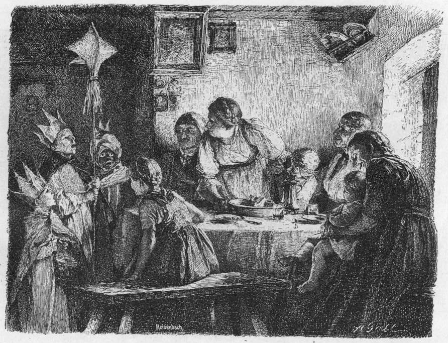 Die heiligen drei Könige mit ihrem Stern